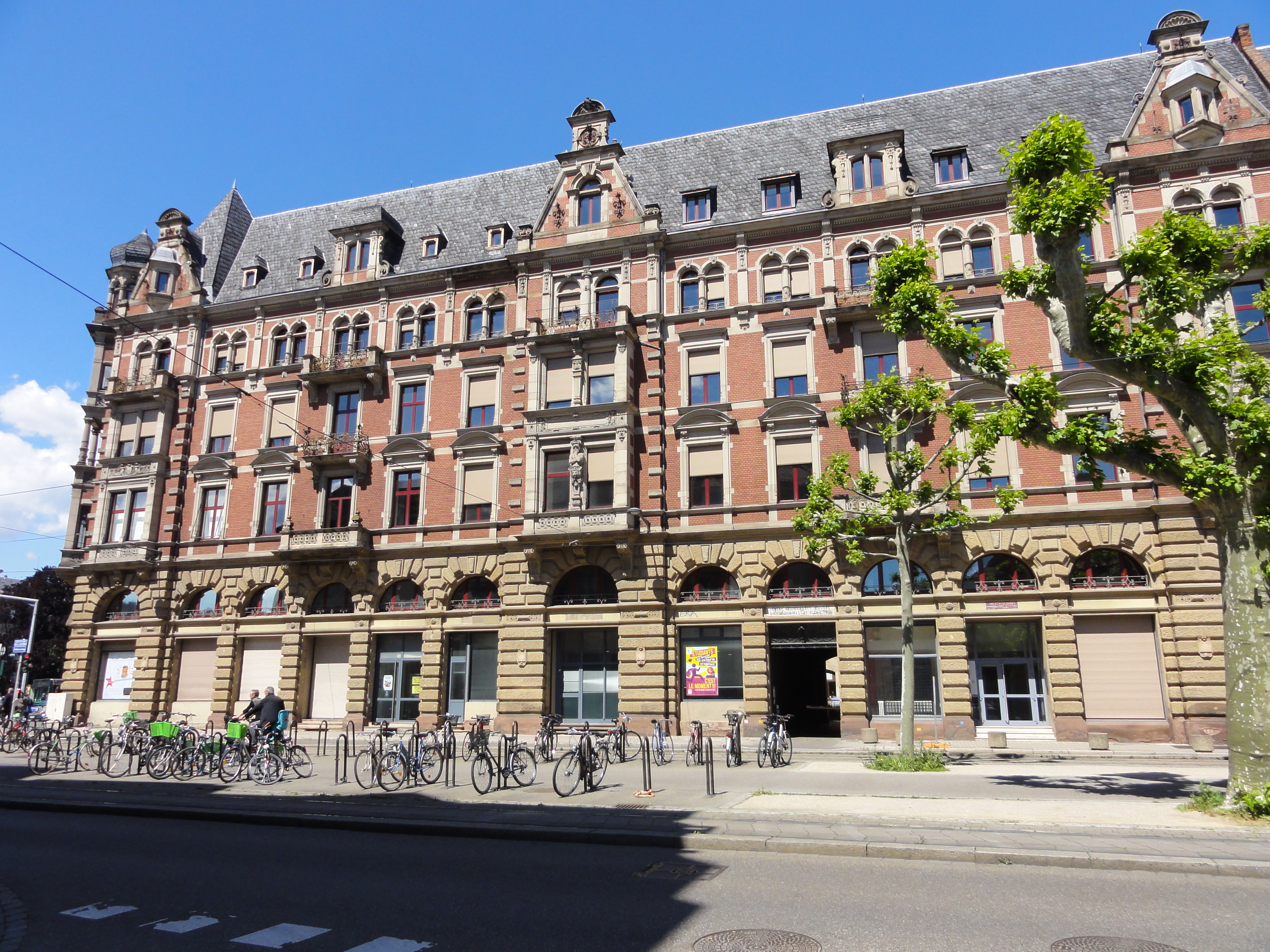 Alsace, Bas-Rhin, Strasbourg, Immeuble Gallia (1885), 1 boulevard de la Victoire. Voir des informations sur le bâtiment: [1]